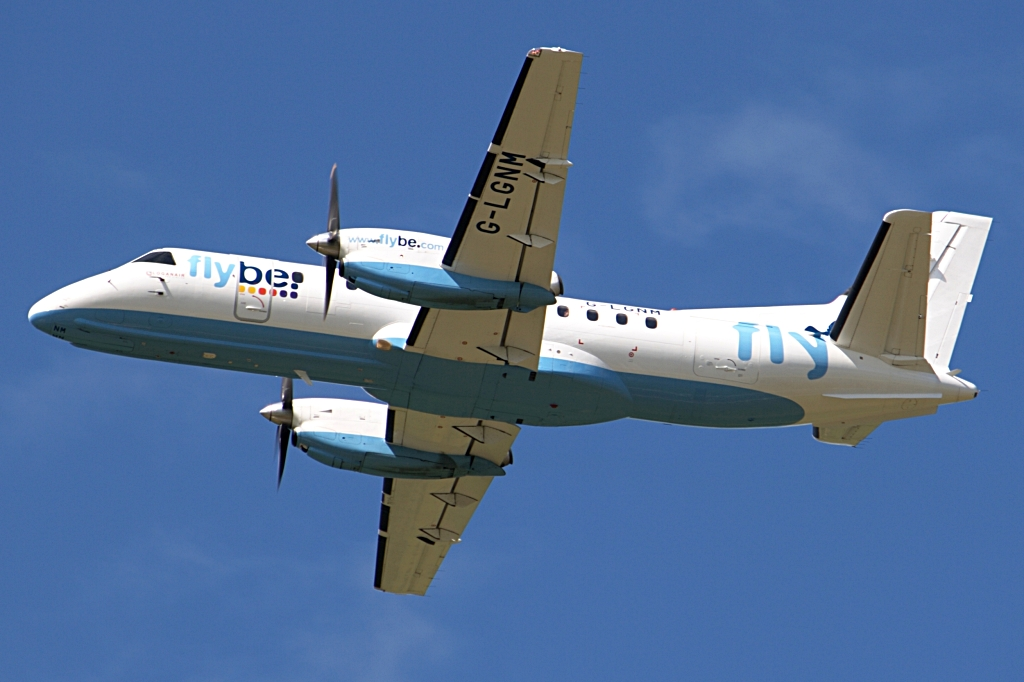 Flybe (Loganair) Saab 340B G-LGNM